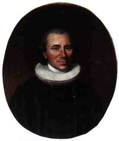 Porträt des Pastors Johann Rudolf Christiani (1761-1841)